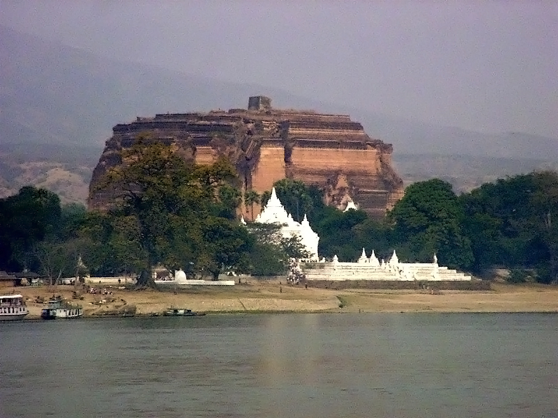 MINGUN-PAGODE am Irrawaddi in Myanmar